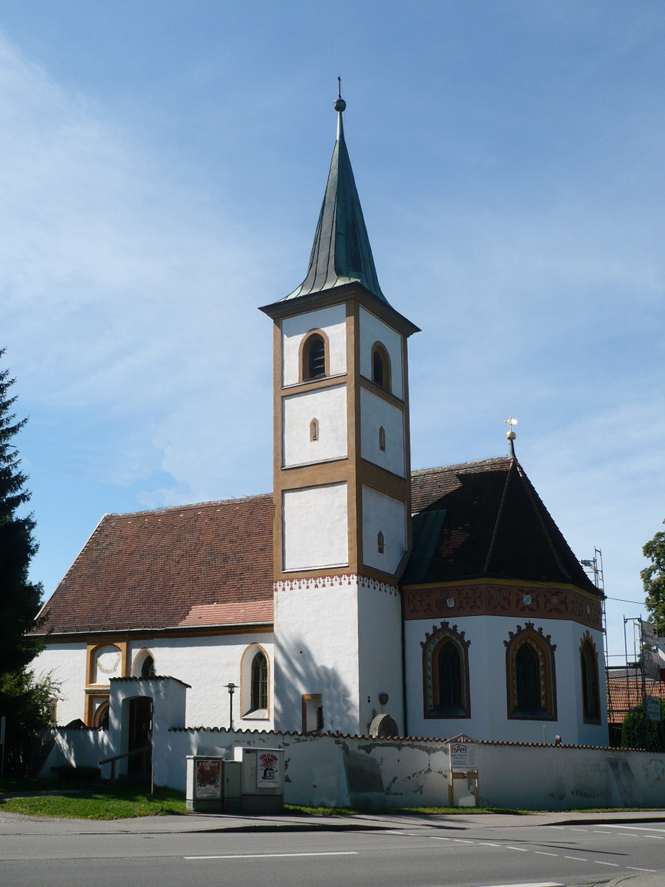 Kirche St. Wolfgang in München.